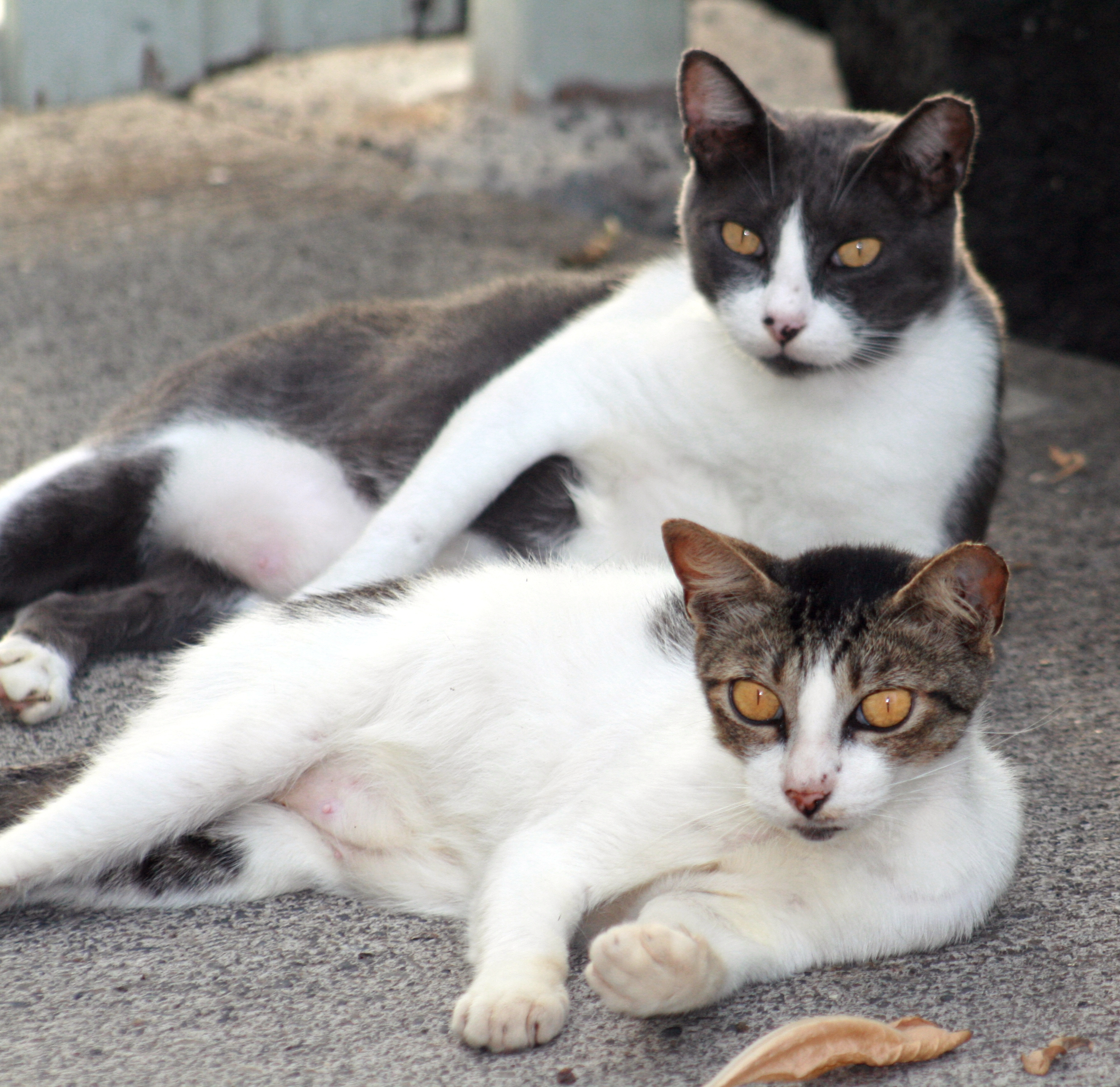 Feral Cats